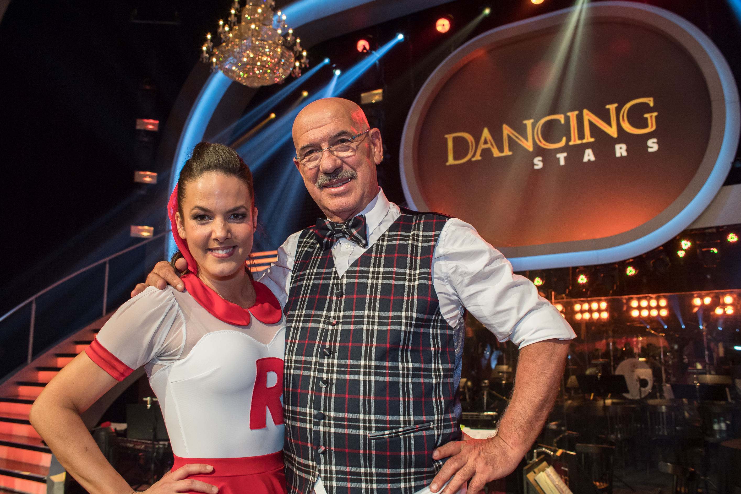 ORF Dancing Stars am 28. April 2017 im ORF-Zentrum Wien. Bild zeigt Roswitha Wieland und Otto Retzer.